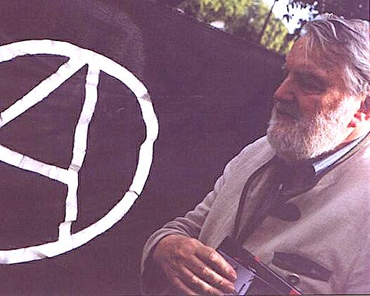 Osvaldo Bayer frente a una bandera anarquista. Esta imagen ya existía en wikimedia commons, mas si se la utilizaba con un tamaño pequeño, no se identificaba a Bayer, ya que tenía una tonalidad oscura. Es por eso que le mejoré la luz y la recorté. El fichero original era: Image:Osvaldo_y_el_símbolo(7-12-2003).jpg